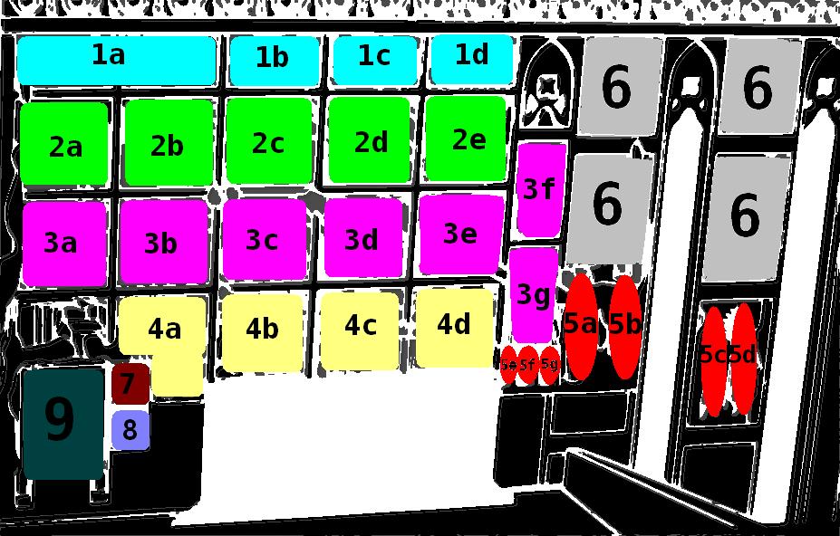 Schema degli affreschi della parete orientale della chiesa di Napoli Santa Maria Donnaregina Vecchia 1. Scene della Passione di Cristo a) Ultima Cena b) Lavanda dei Piedi c) Preghiera nel Getsemani d) Bacio di Giuda 2. Scene della Morte di Cristo a) Flagellazione b) Cristo davanti a Pilato c) Cristo deriso si avvia al Calvario d) Crocefissione e) Morte 3. Scene della Resurrezione di Cristo a) Deposizione b) Resurrezione c) Discesa nel Limbo d) Cena di Emmaus e) Incredulità di San Tommaso f) Ascensione g) Pentacoste 4. Storie di Sant'Elisabetta d'Ungheria a) Nozze di Sant'Elisabetta b) La Santa saluta il marito che parte per le crociate c) L'offerta del grano e del manto d) La Santa lava i piedi agli infermi e Morte della Santa 5. Santi a) Santo Stefano b) San Lorenzo c) San Tommaso d) Elia e) San Ladislao d'Ungheria f) Santo Stefano d'Ungheria g) Santa Elisabetta d'Ungheria 6. Apostoli e Profeti 7. Annunciazione 8. Sacra famiglia 9. Madonna delle Grazie tra San Sebastiano e San Rocco